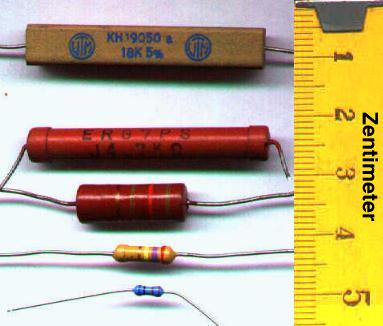 Photo einer Auswahl von Widerständen, GFDL aufgenommen von Honina 16:27, 7. Okt 2003 (CEST)